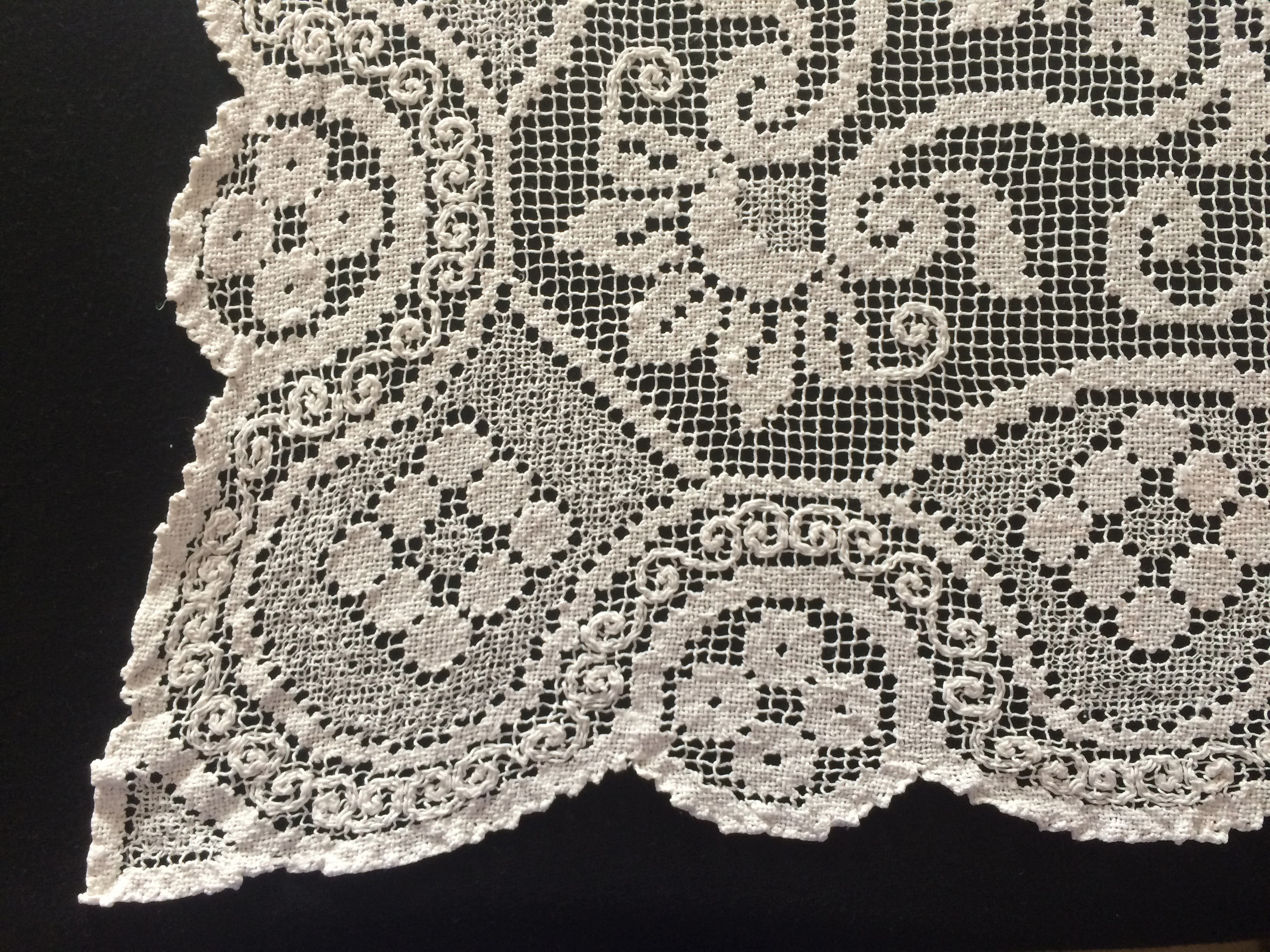 Hjørne av filert duk